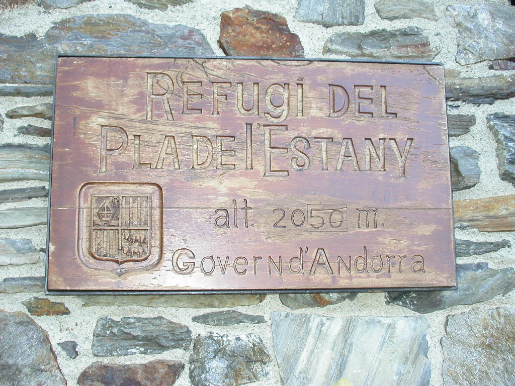 Refuges Andorre